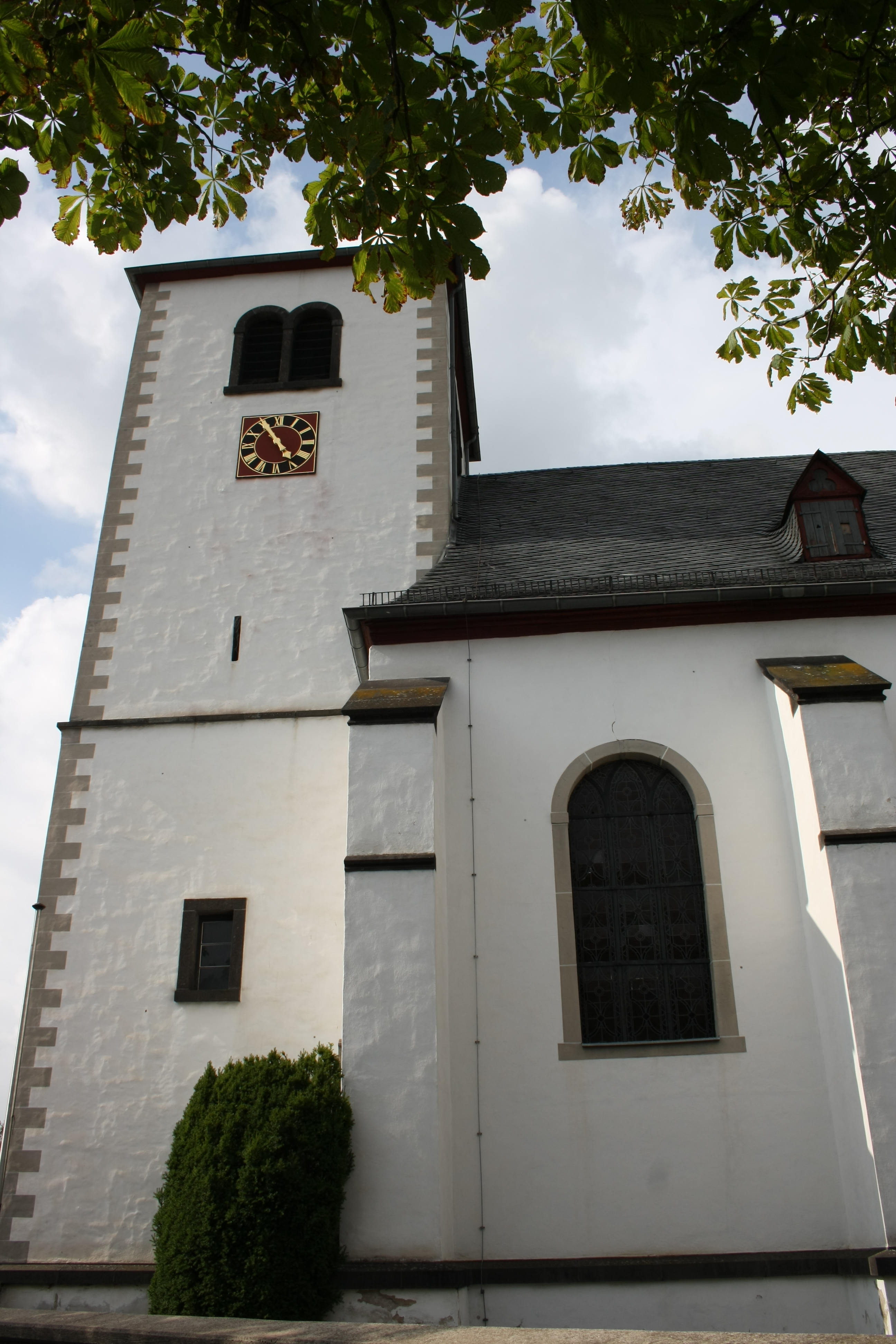 Turm der katholischen Kirche St. Georg in Fritzdorf